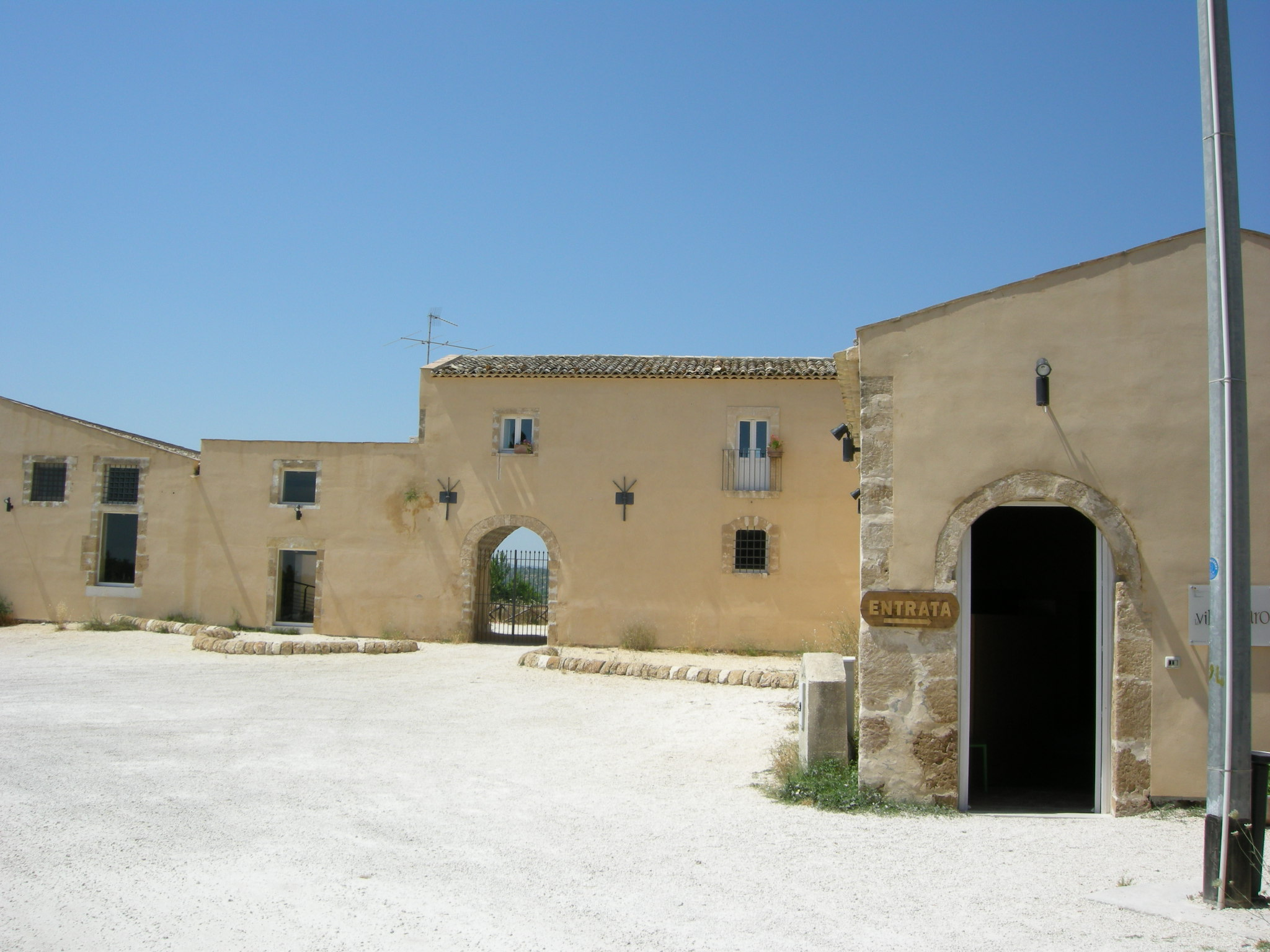 Villa Romana del Tellaro (Noto), casale